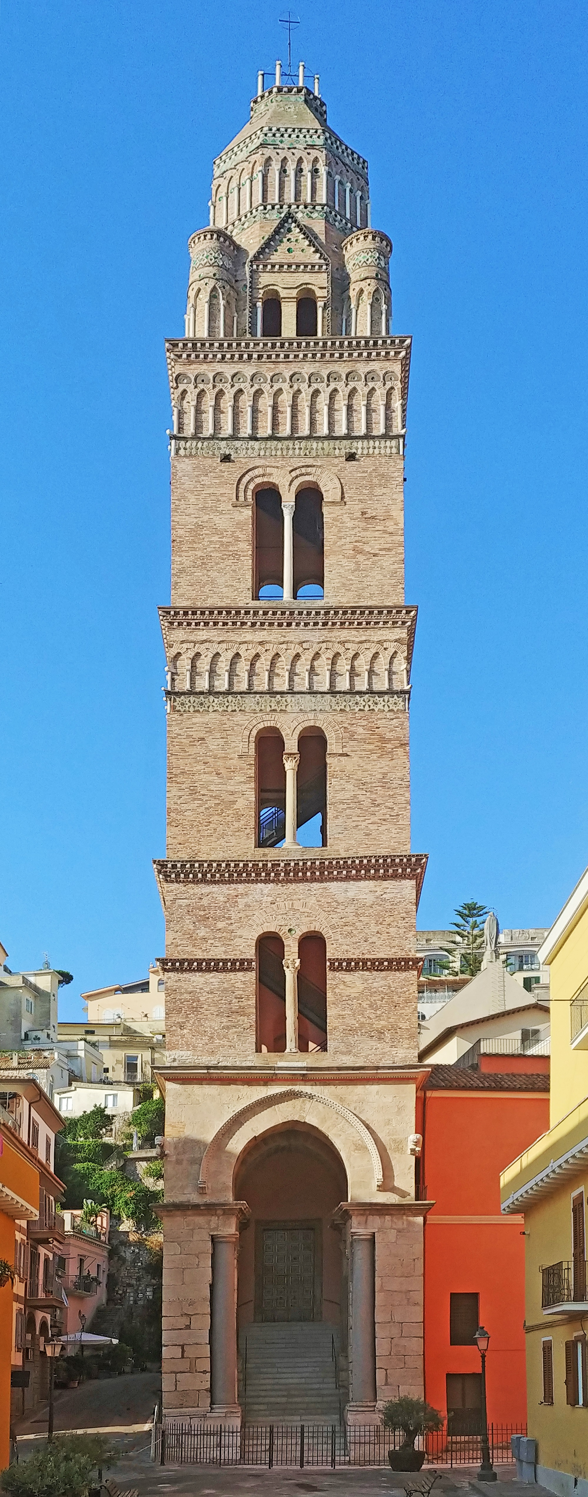 Campanile.